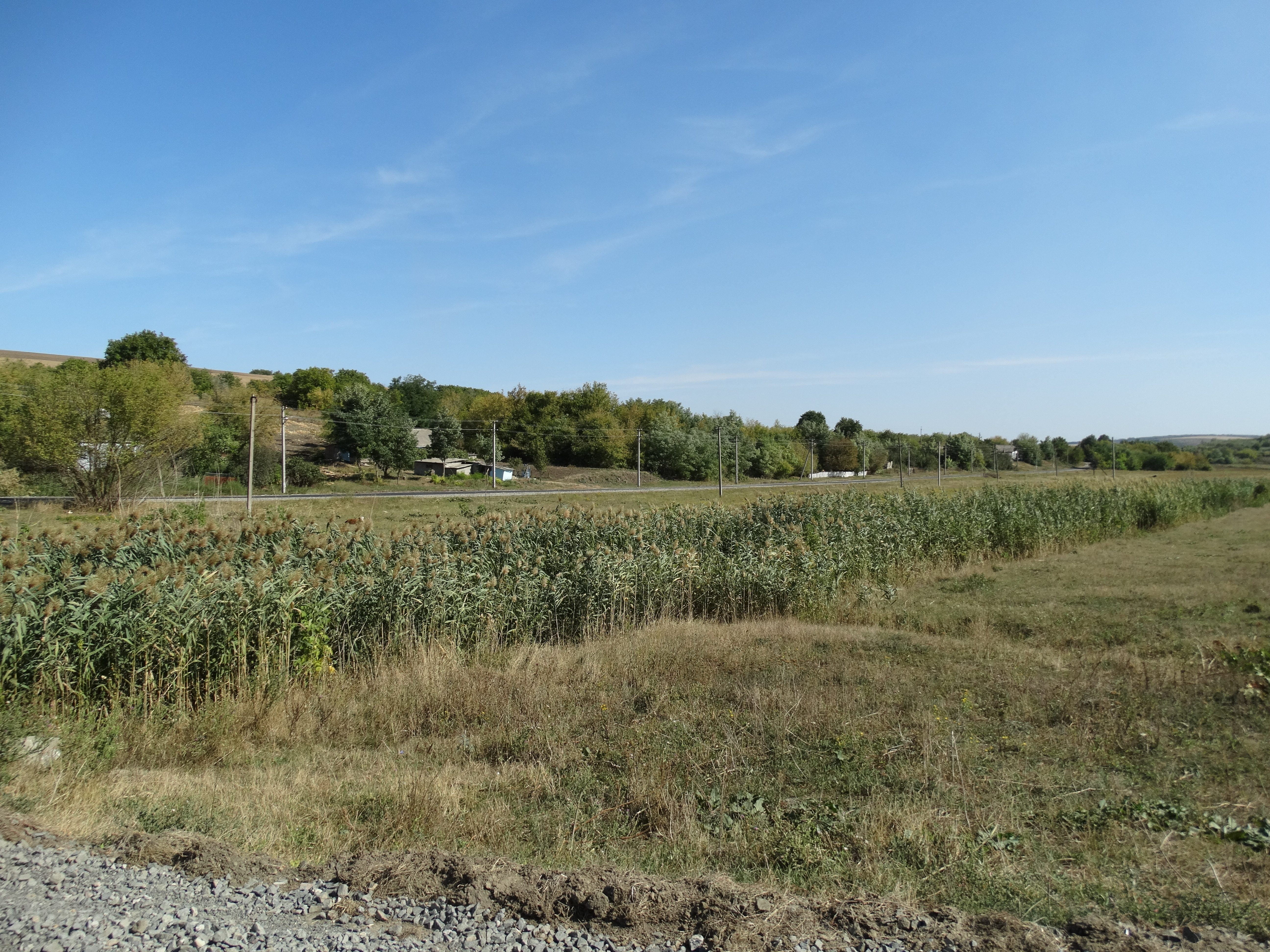 Вікіекспедиція на північ Одещини